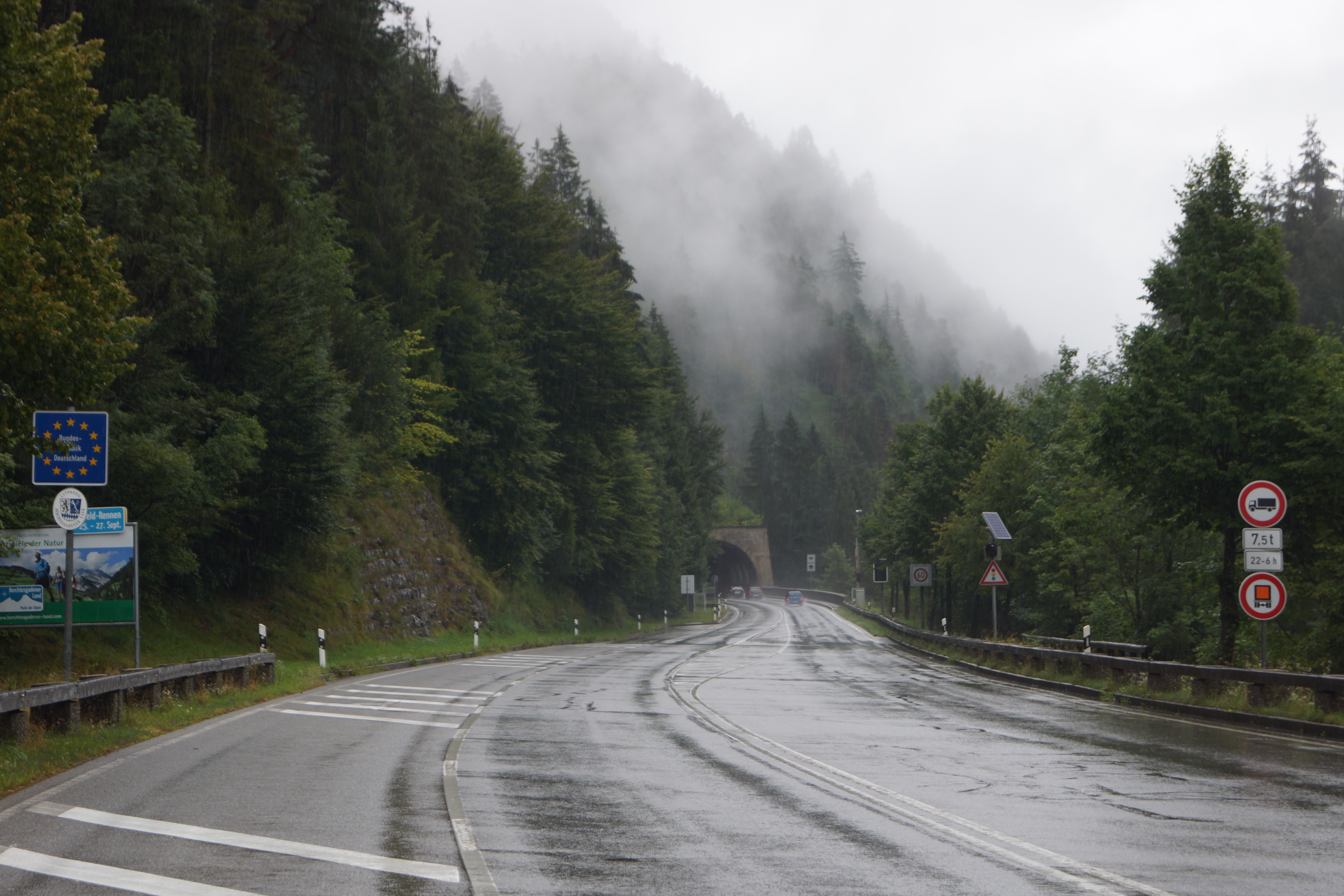 Germany, Bavaria